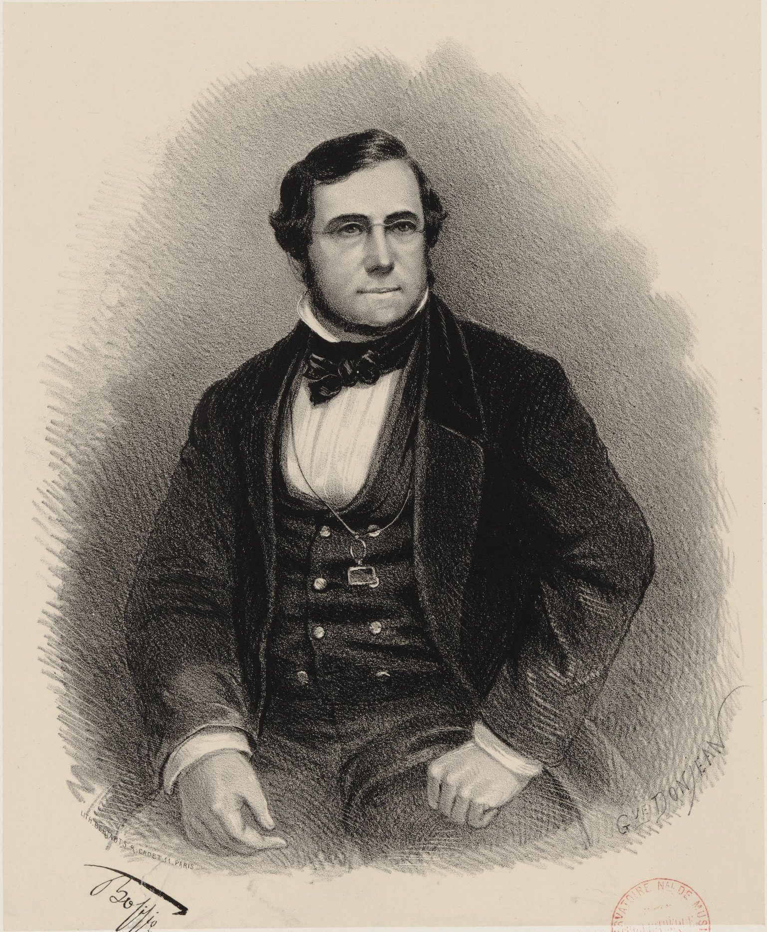 Portrait du compositeur et chef d'orchestre parisien Crispiniano Bosisio, également compositeur.